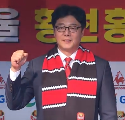 FC서울 황선홍 감독 취임 기자회견 2.23 분 장면